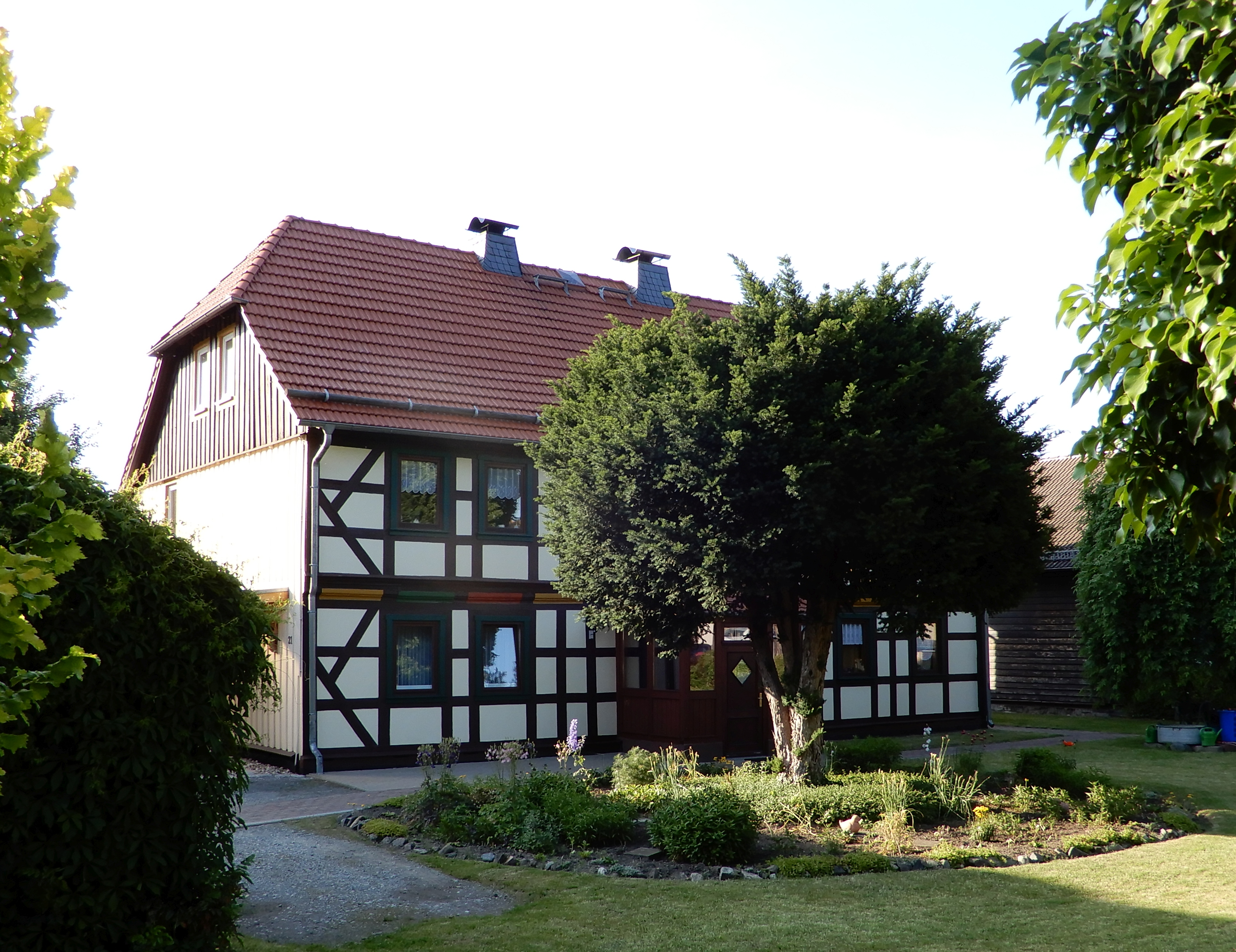 Wohnhaus am Mönchstieg 21 von der Friedrichstraße aus gesehen